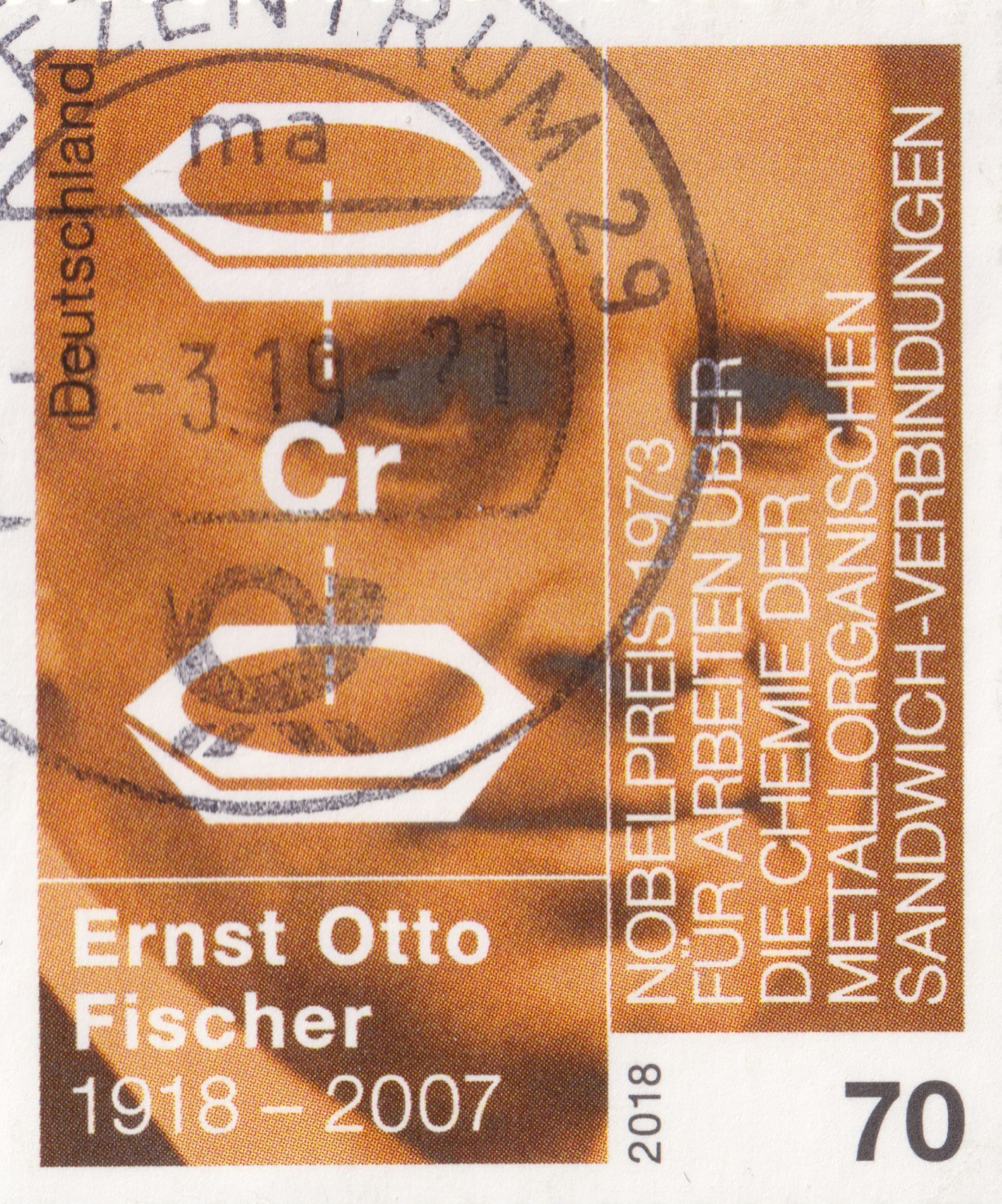 Abgestempelte Briefmarke aus Anlass des 100. Geburtstags des Nobelpreisträgers Ernst Otto Fischer